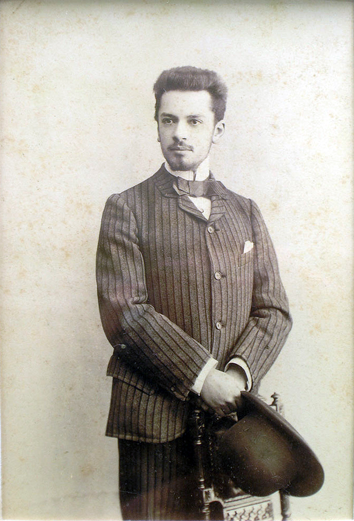 Сергей Владимирович Симанский